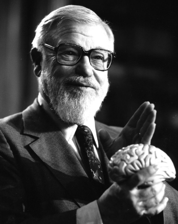 profile